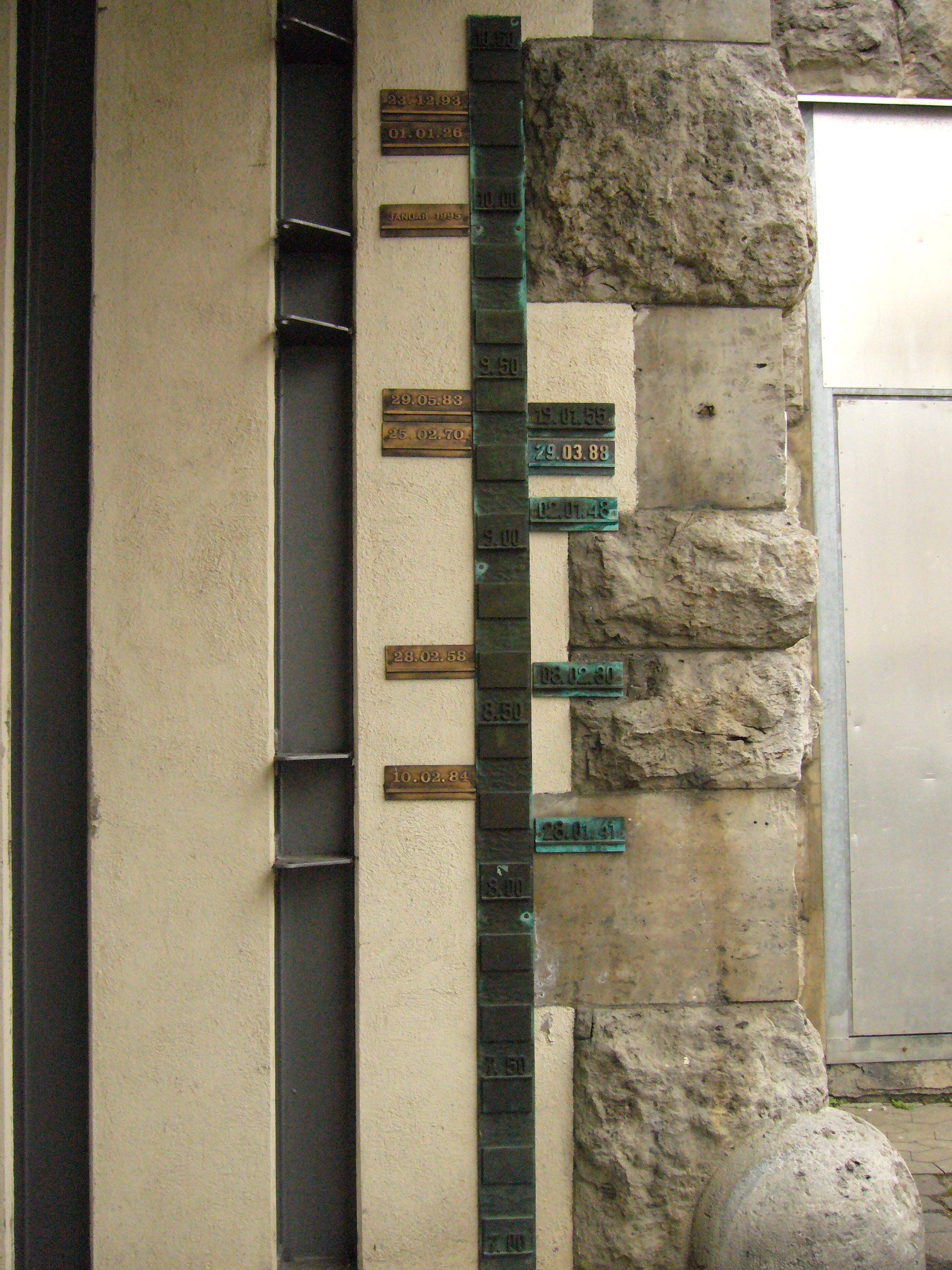 Hochwassermarken